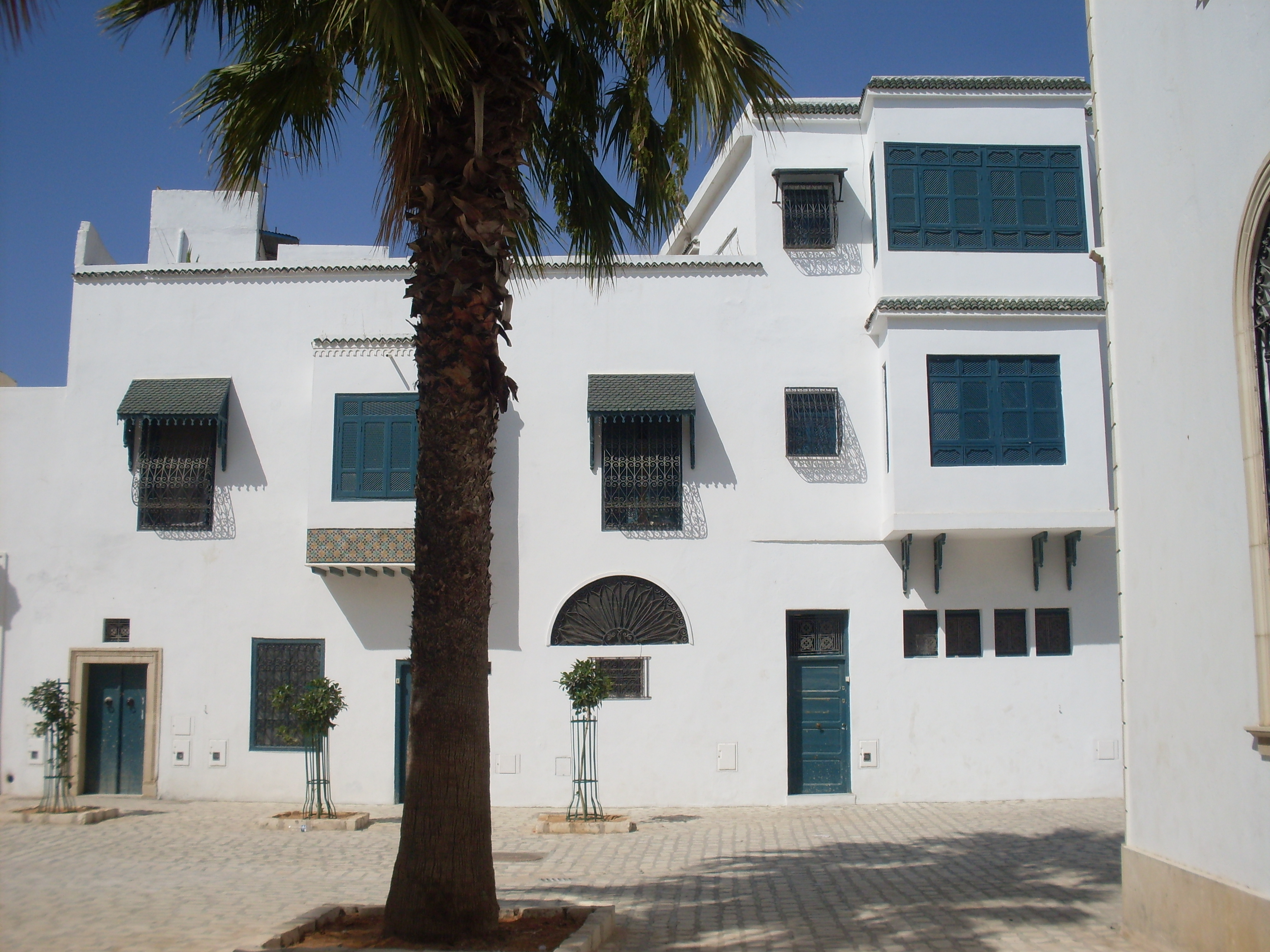 Medina de Tunis, maison à la place du palais Kheireddine, rue du tribunal